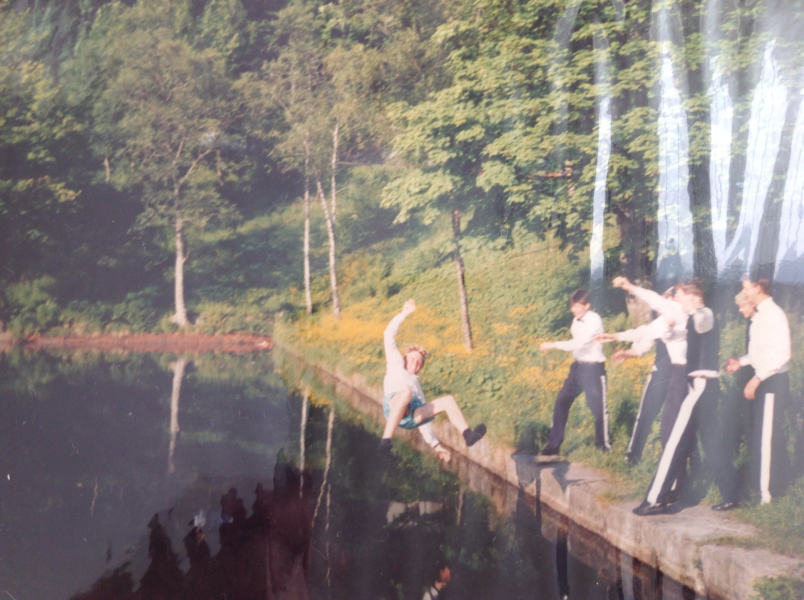 Sjef Holger Hagesæter (1990) kastes tradisjonen tro i Skansedammen etter avsluttningen.